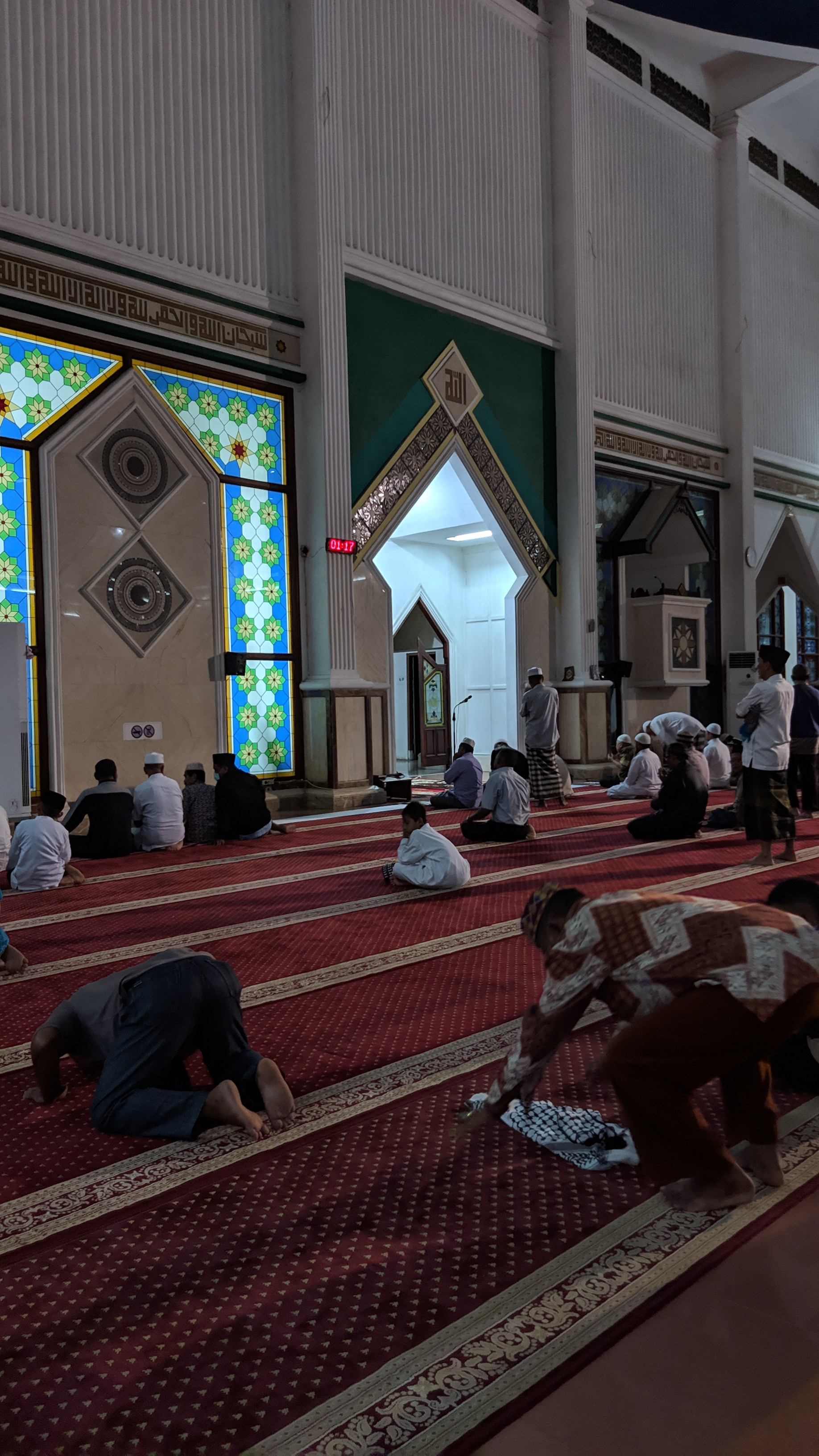 Suasana ibadah salat Maghrib